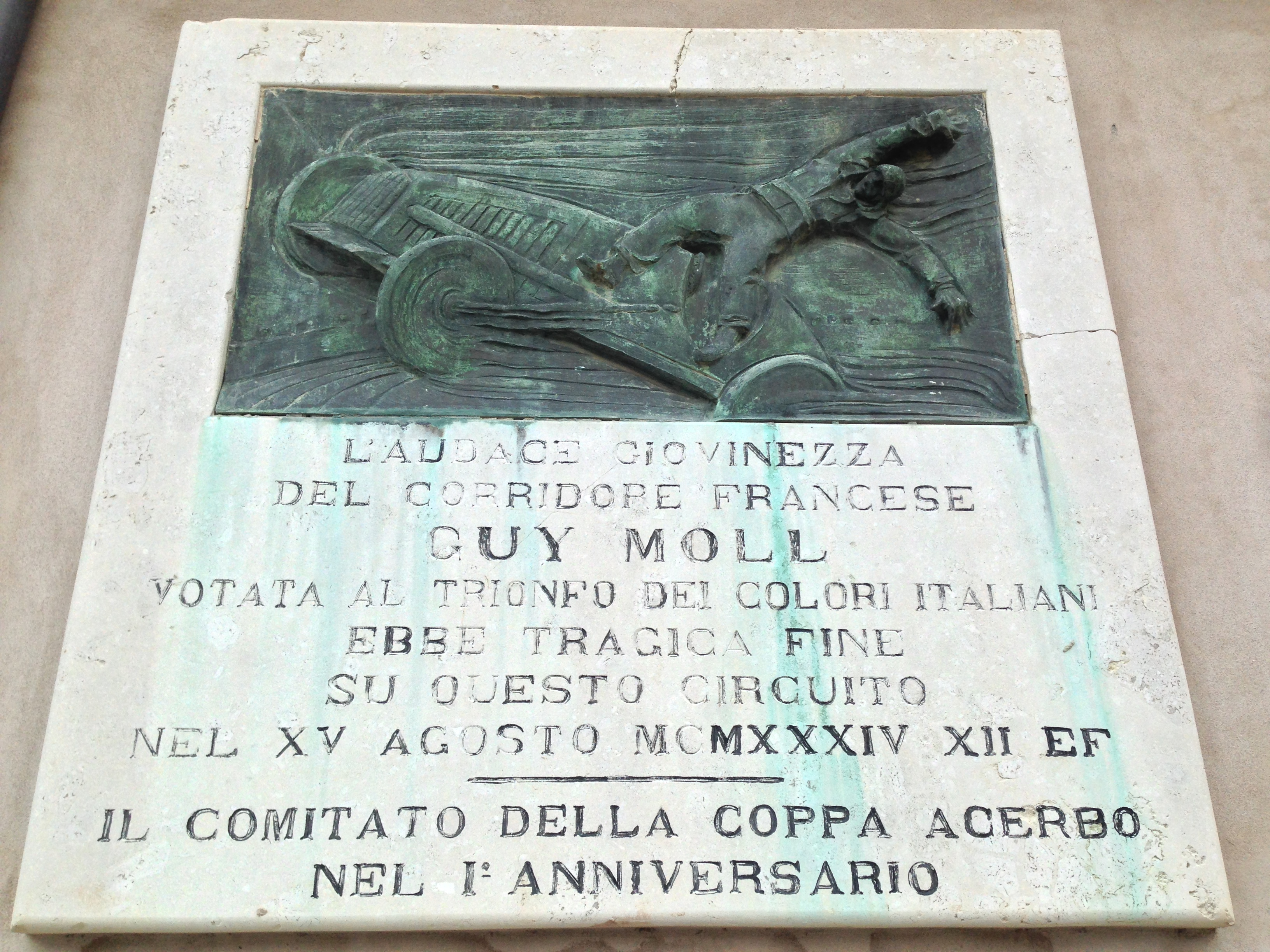 Targa in memoria del grande talento. Si trova a Montesilvano.